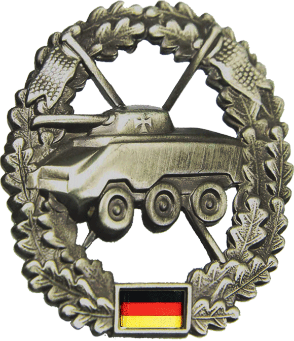 Barettabzeichen der Panzeraufklärungstruppe der Bundeswehr auch Feldnachrichtentruppe Barettfarbe: Schwarz Maße: Hoch: 53mm Breit: 46mm Ausführung: altsilber, Metall